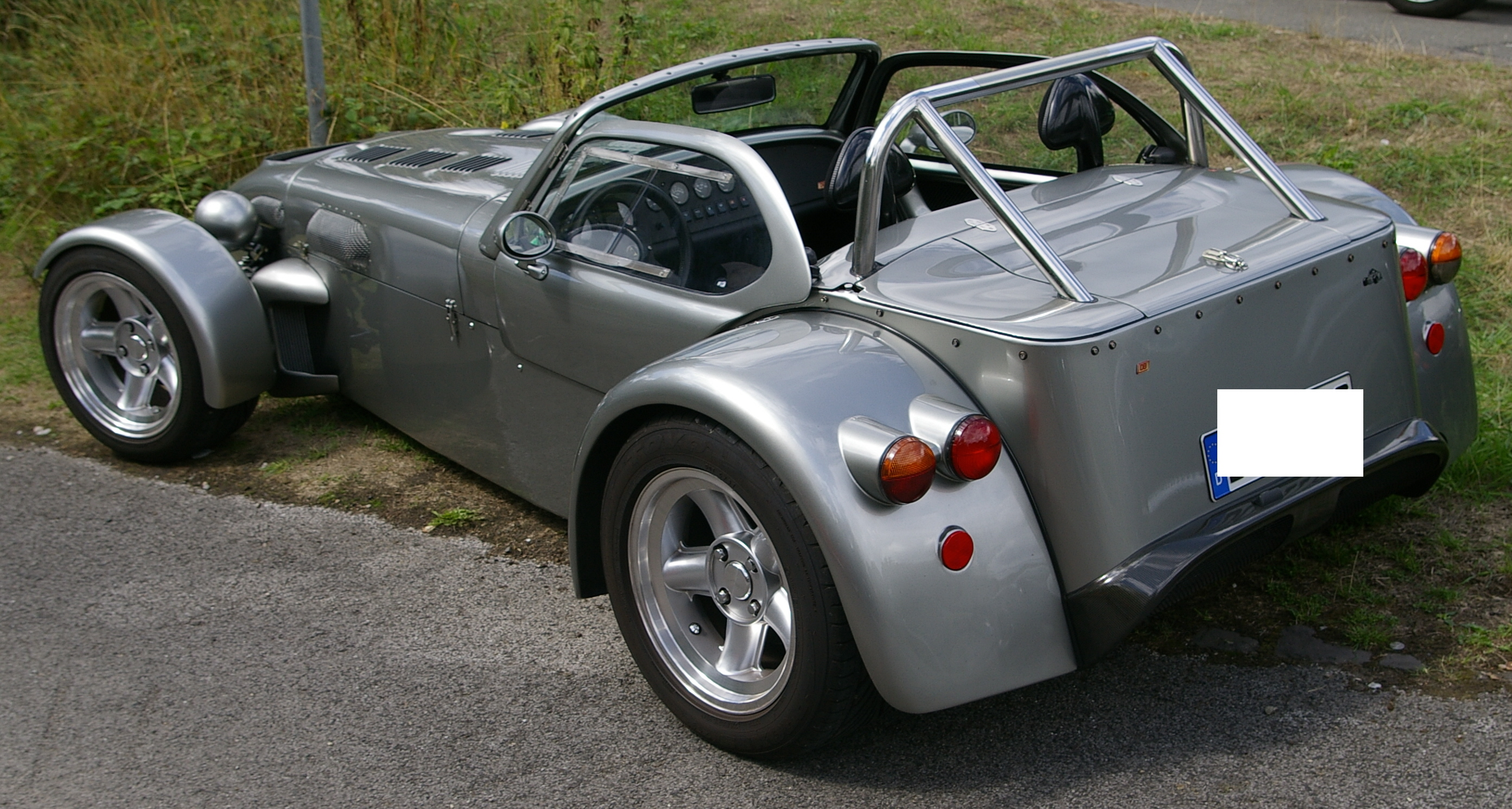 Donkervoort D8 (Lotus Seven Replika). Eigenes Foto, August 2006.